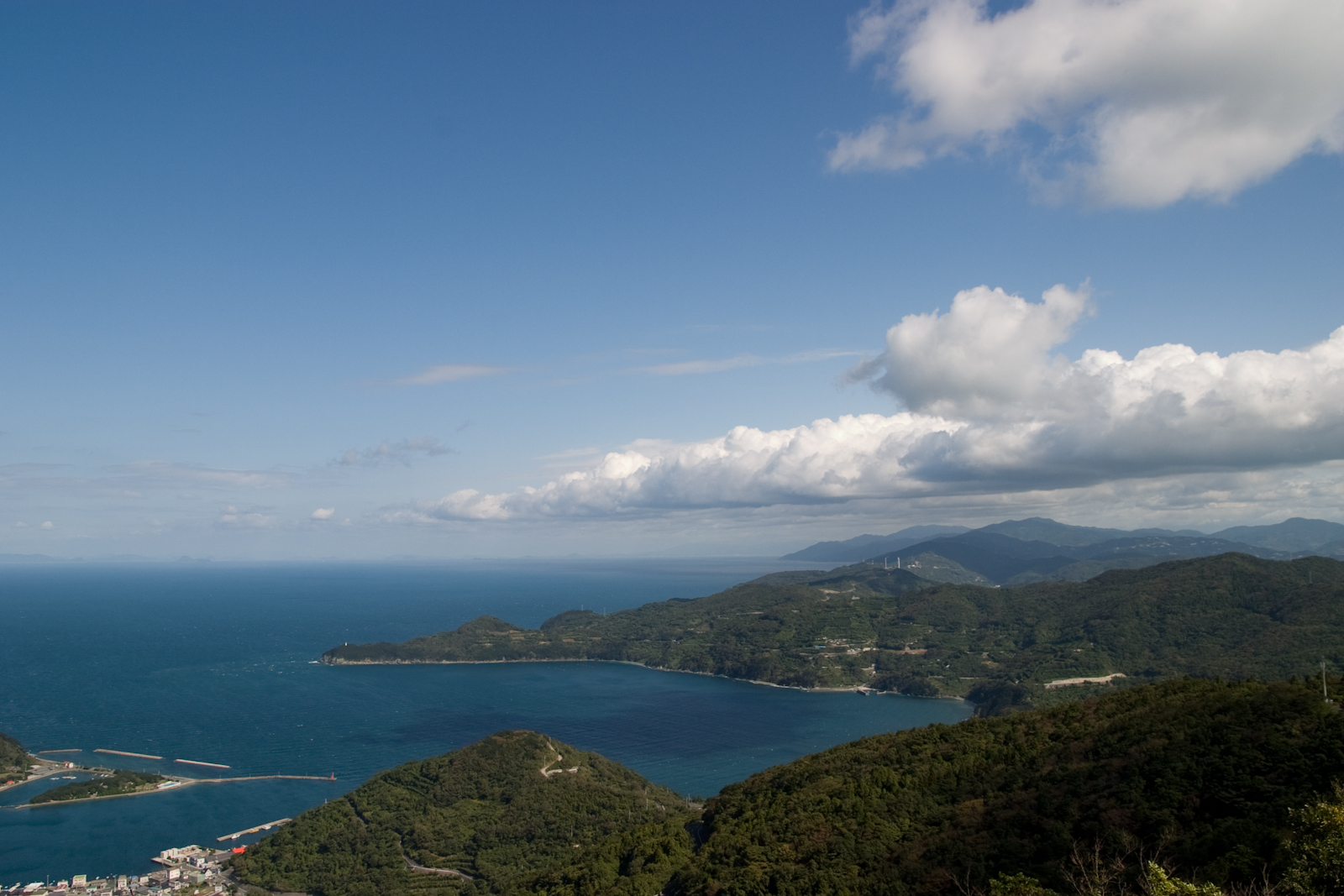 佐田岬半島